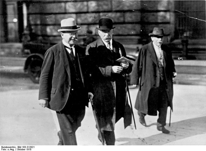 Reichstagsabgeordnete Erzberger, Südekum und Arendt Zentralbild Oktober 1918 UBz: v.l.n.r.: Die Reichstagsabgeordneten Erzberger, Südekum und Arendt beim Verlassen des Reichstags in Berlin. Matthias Erzberger: geb. 20.9.1875 in Buttenhausen, 26.8.1921 auf dem Kniebis bei Griesbach von den reaktionären früheren Offizieren Schulz und Tillessen erschossen. Zentrumsabgeordneter. Albert Südekum: geb. 25.1.1871 in Wolfenbüttel; gest. Februar 1944. Sozialdemokratischer Abgeordneter. Otto Arendt: geb. 10.10.1954 in Berlin, Politiker und Nationalökonom, als Freikonservativer (Reichspartei) Reichstagsabgeordneter. Abgebildete Personen: Erzberger, Matthias: Reichsfinanzminister, Vizekanzler, Deutschland (GND 11853100X) Südekum, Albert O. W. Dr. phil.: Preußischer Finanzminister, MdR, Leutnant, Deutschland